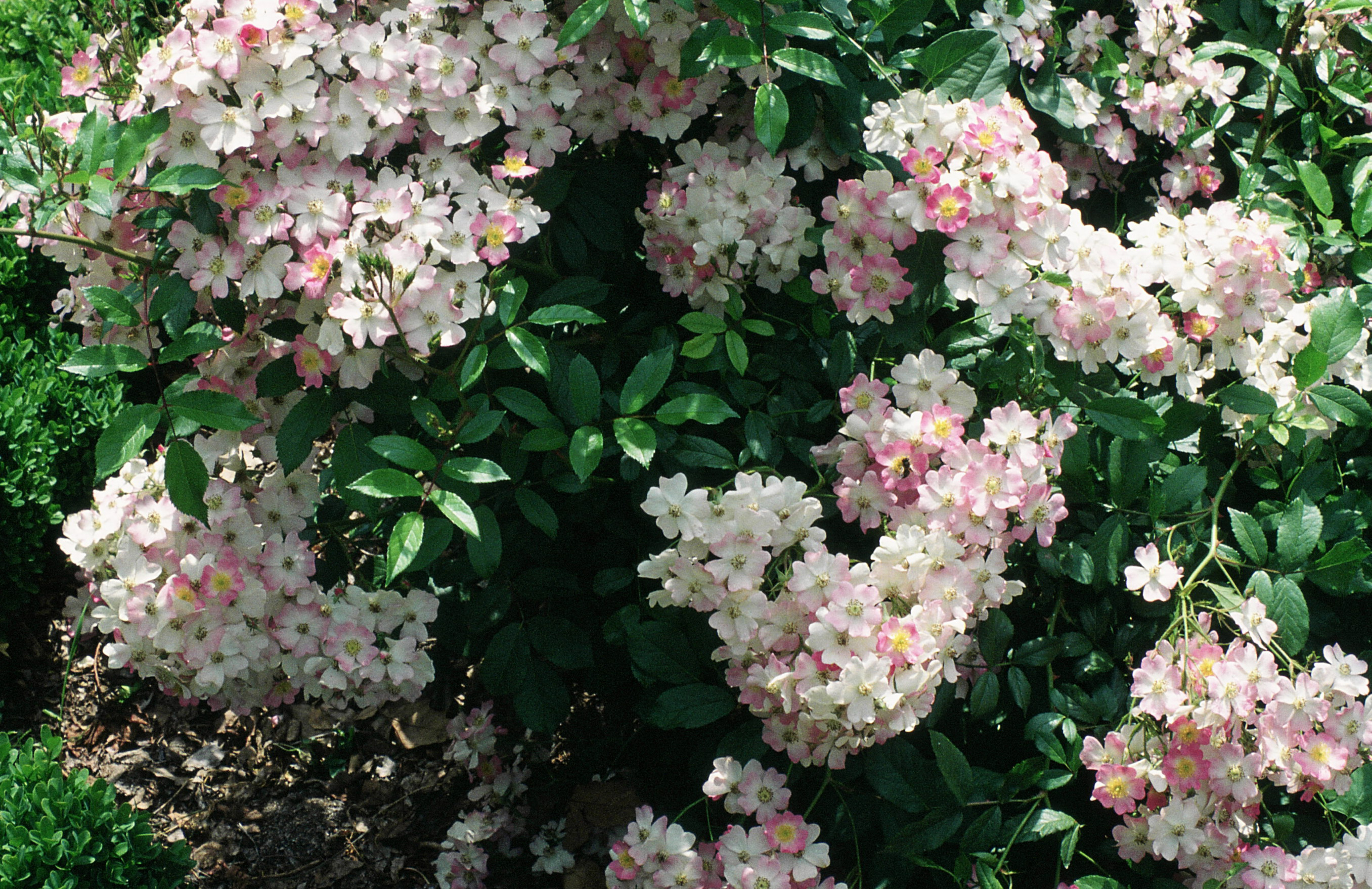 Rosa 'Ballerina', hybr. Moschata, sect. Synstylae. Real Jardín Botánico, Madrid, A. Barra